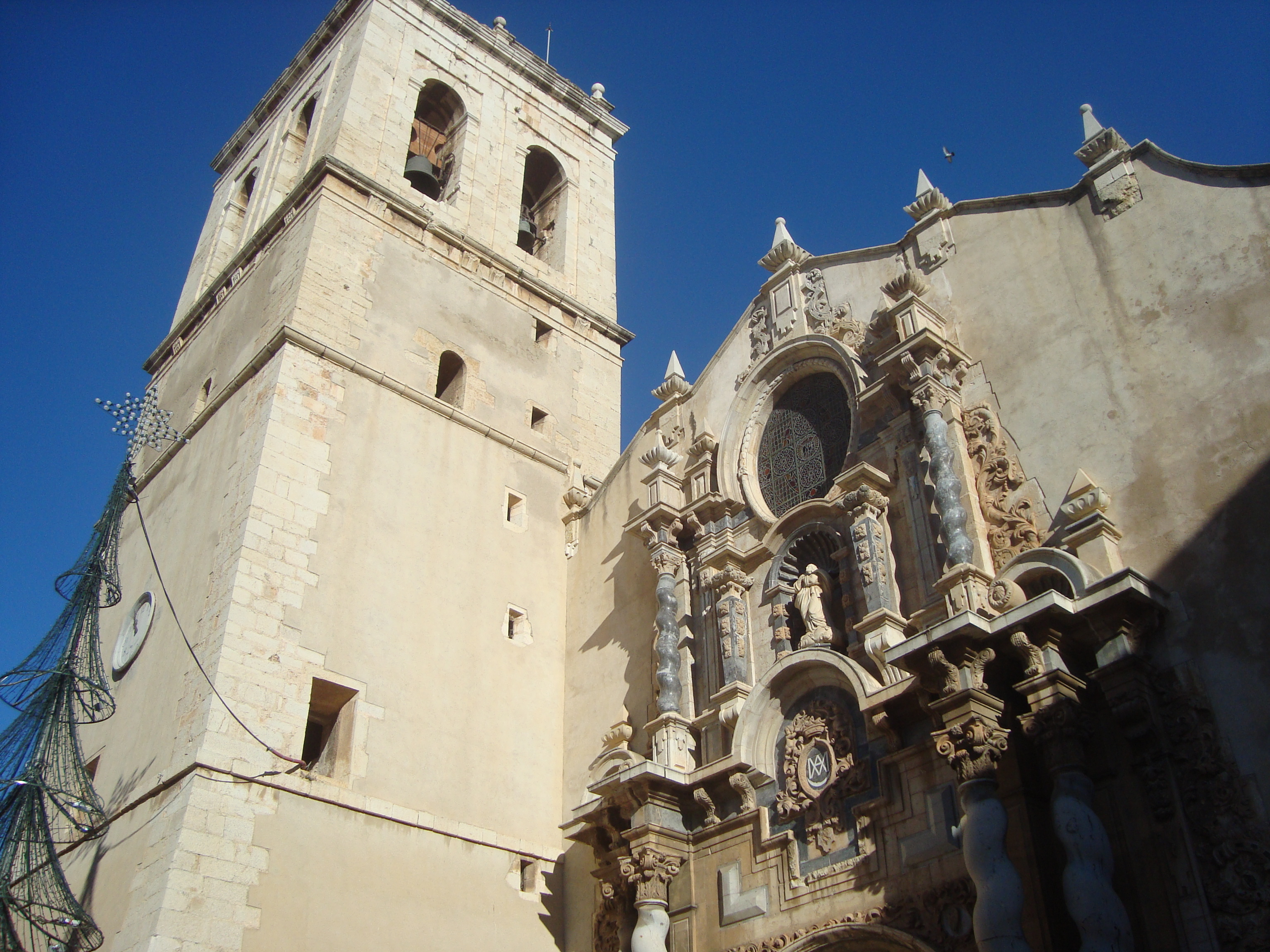 Església parroquial de l'Assumpció (Vinaròs)